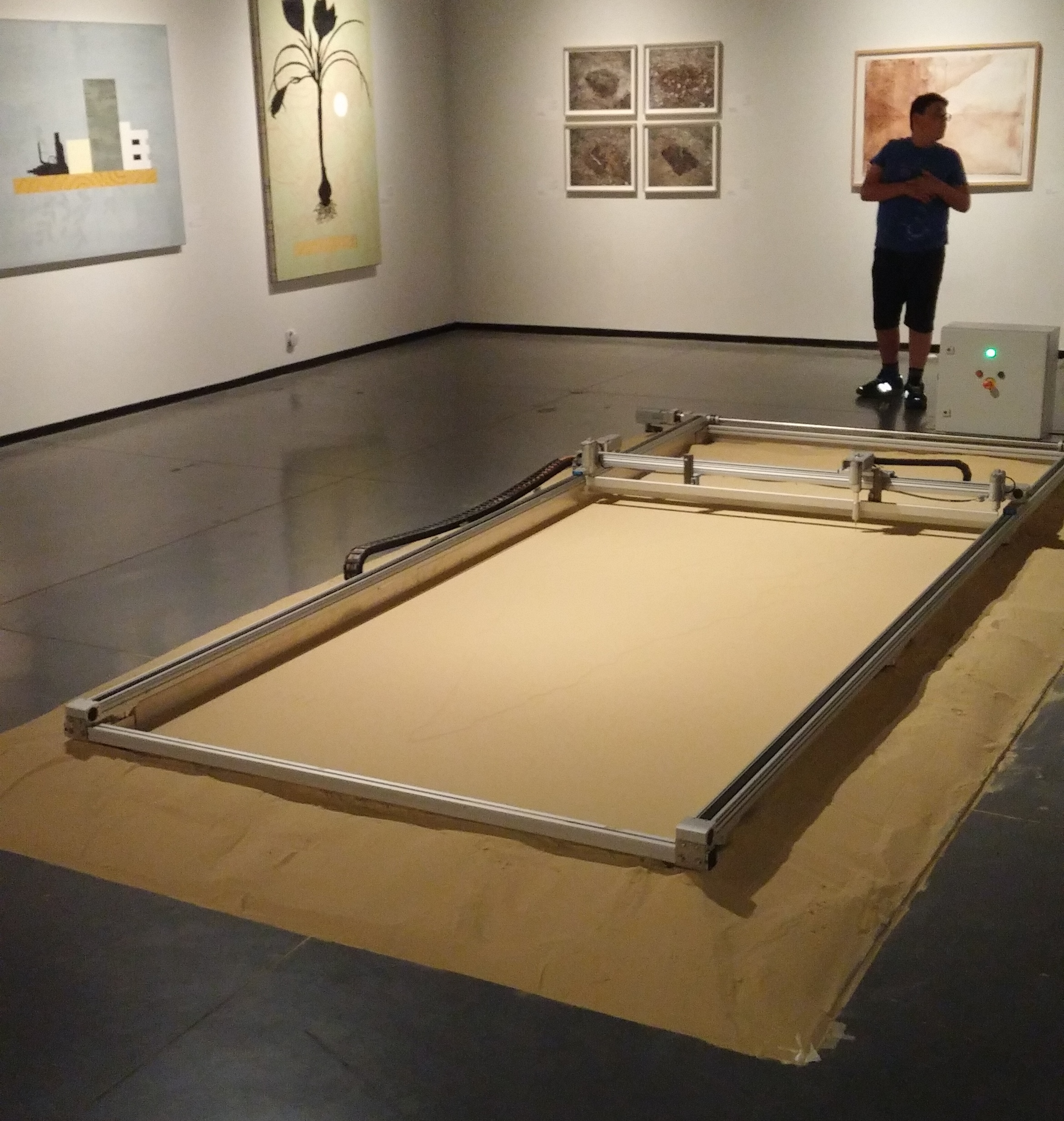 פלוטר ענק באורך 5 מטר